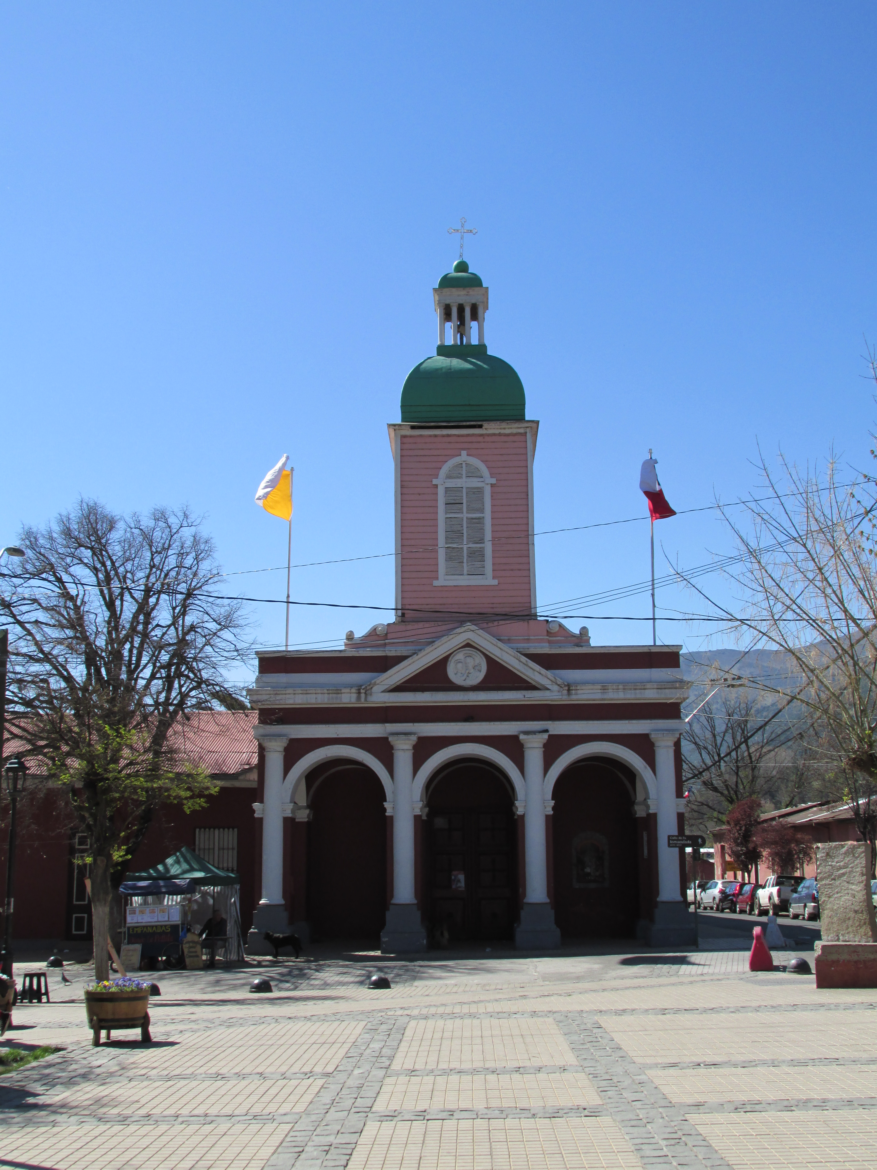 Iglesia de San José de Maipo This is a photo of a national monument in Chile: 886